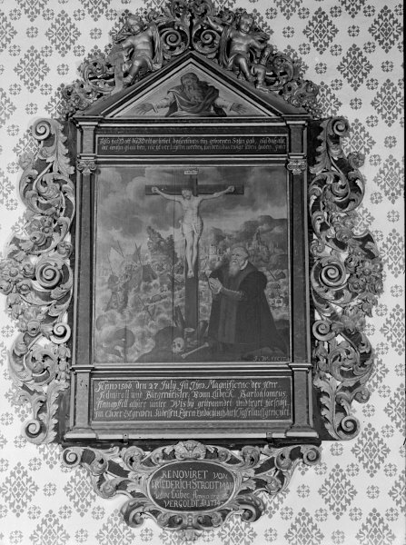 Epitafium över Bartholomeus Tinnapfel, död 1566. Kategori: (09) EpitafierEpitafium över Bartholomeus Tinnapfel, död 1566.